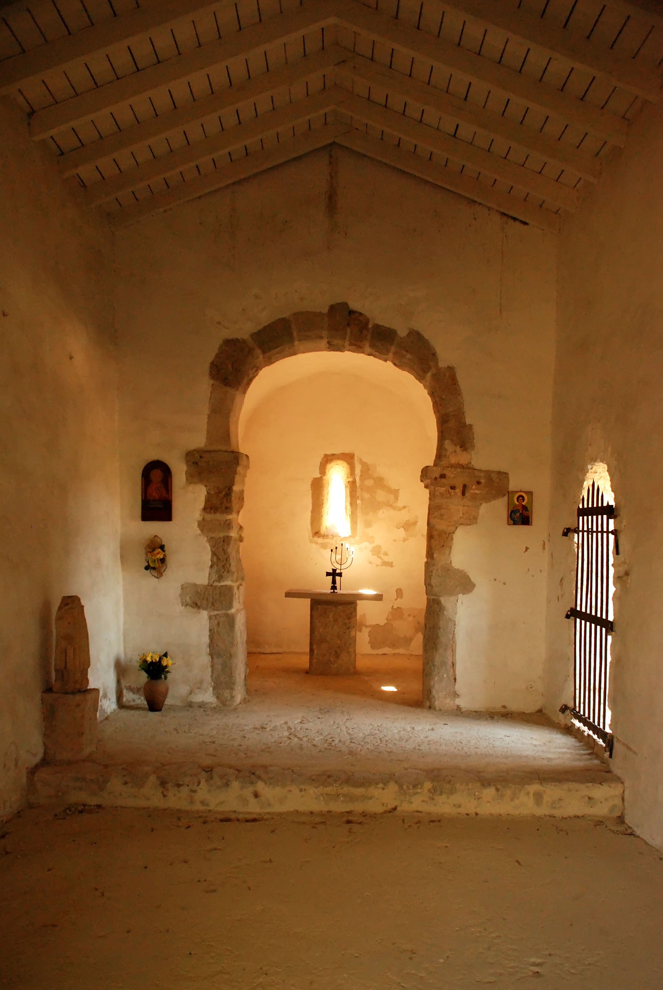 France - Languedoc - Aude - Moussan - chapelle Saint-Laurent (préroman) .